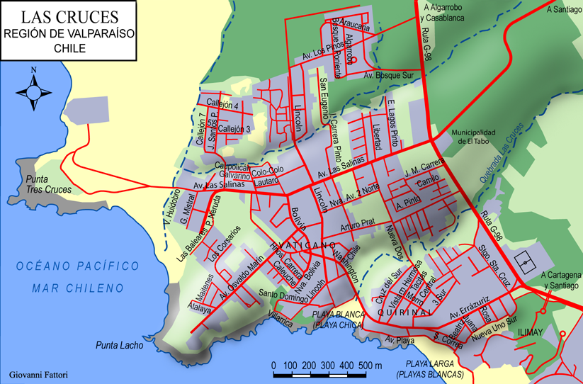 Mapa de Las Cruces, comuna El Tabo, Región de Valparaíso, Chile. Información suelos: Hierba=verde cl., Bosque=verde osc., arena=amarillo, roca=gris, construído=lila.